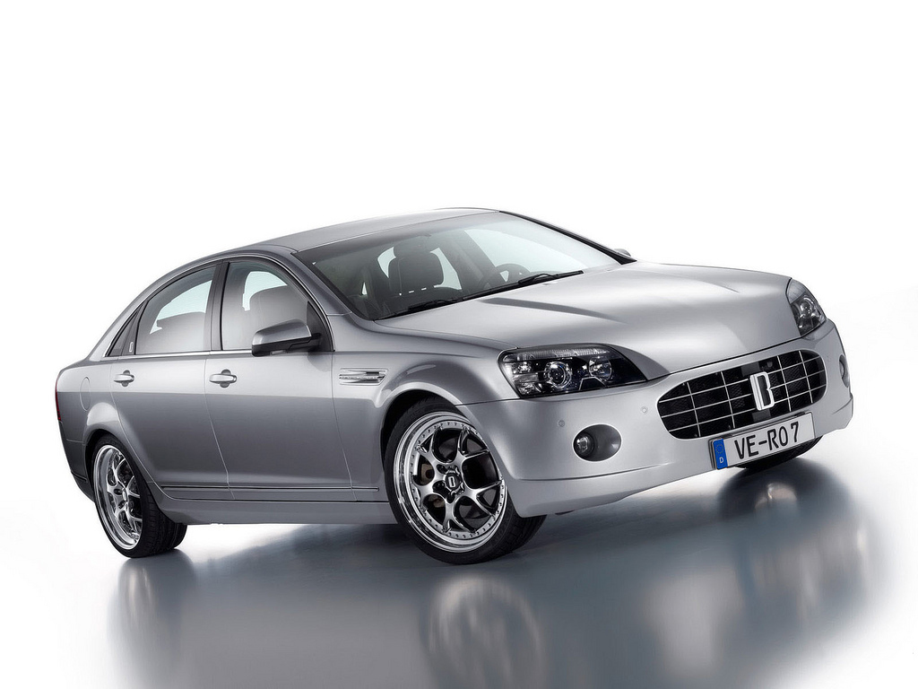 Bitter Vero, Derivat von File:Bitter Vero.jpg ohne Wasserzeichen